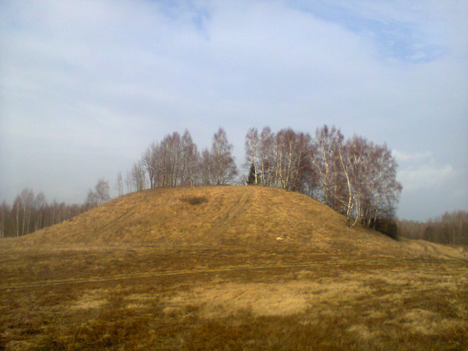 Чорная гара (хутар Мікольцы)